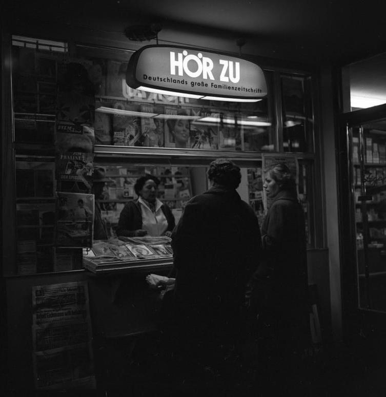 Wuppertal - Zeitungskiosk